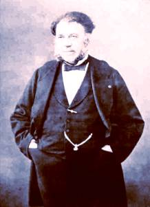 Der französische Architekt Paul Abadie (1812-184)